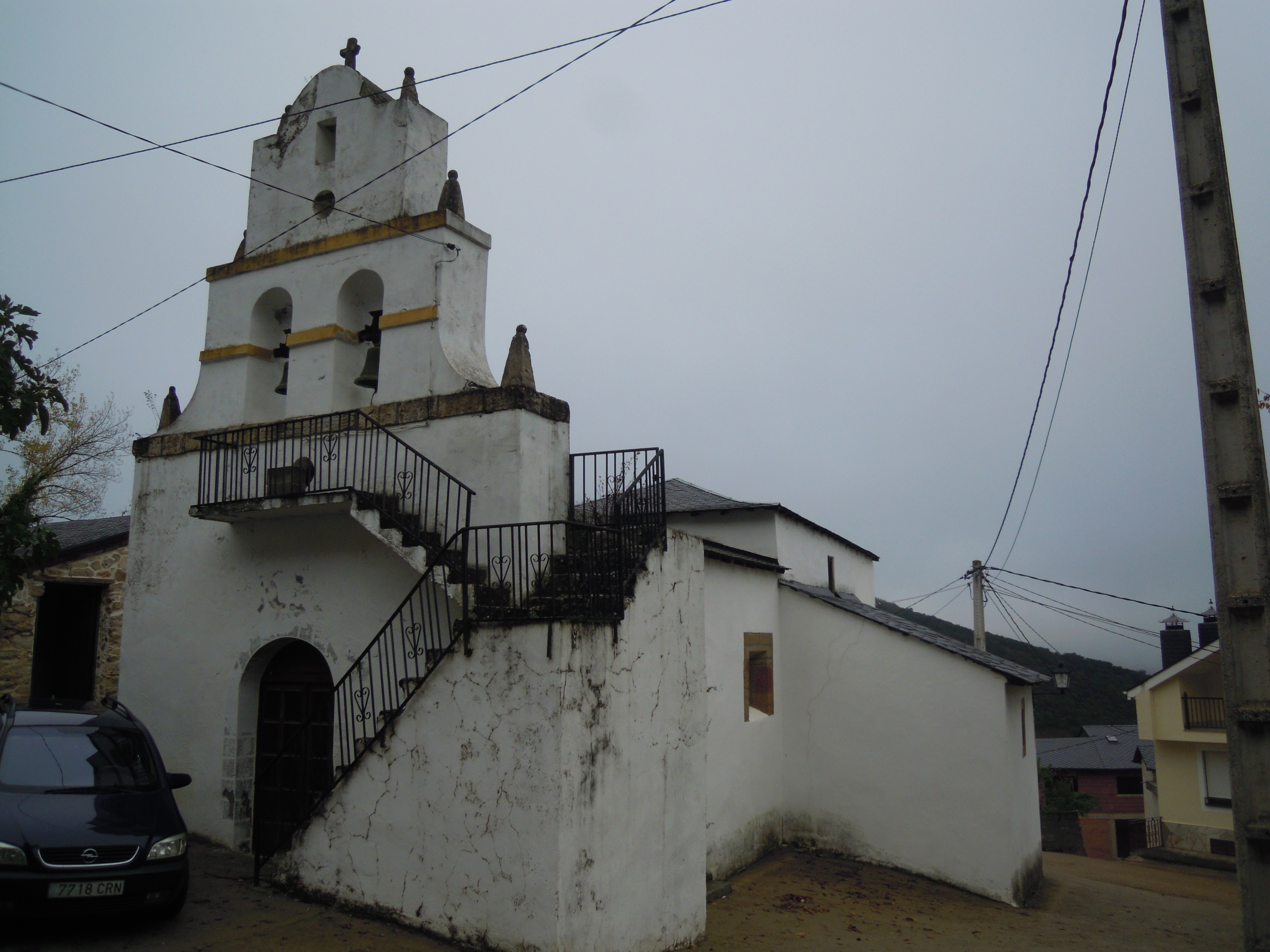 Igrexa en Vilardesilva (Pardollán, Rubiá)